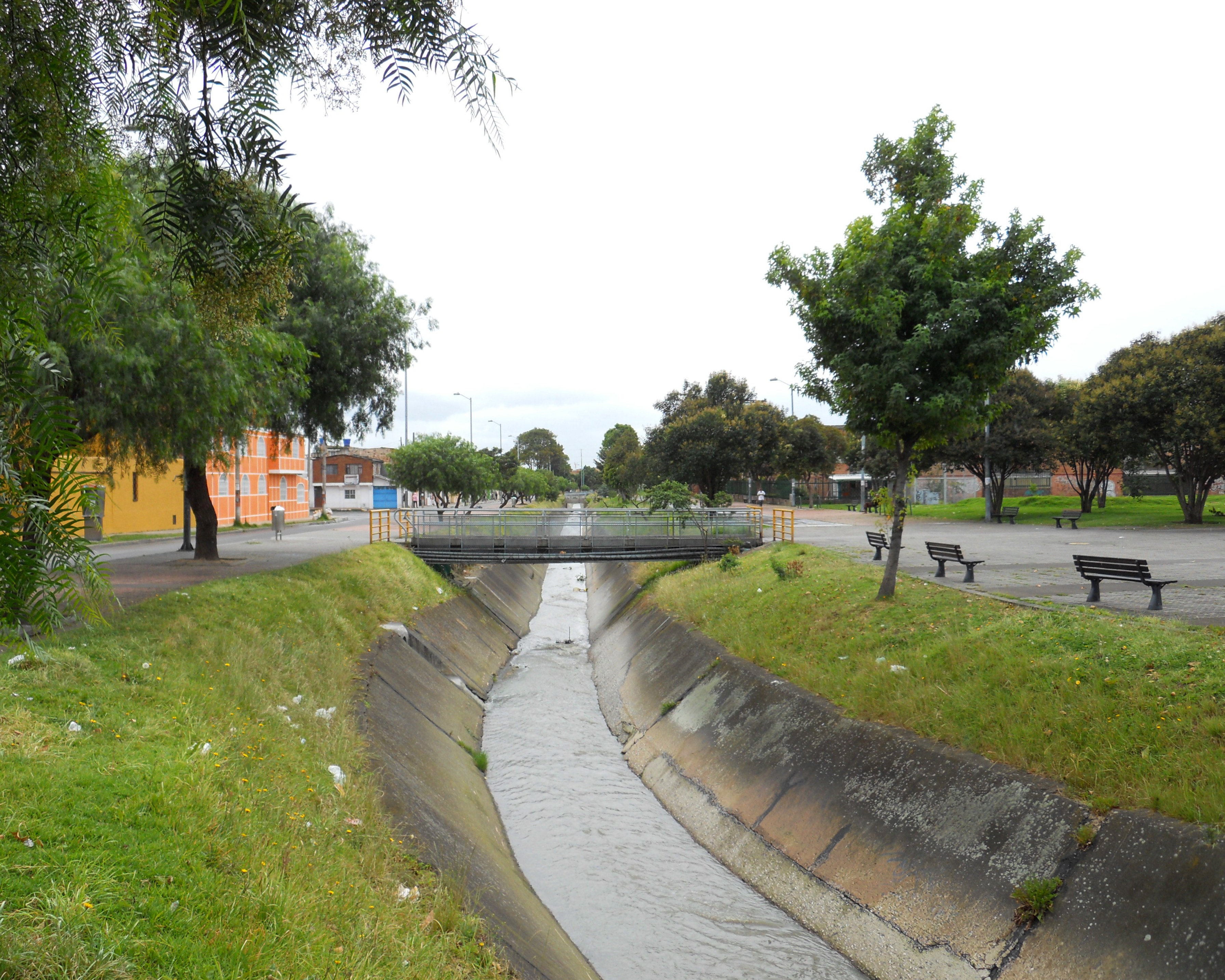 Canal La Albina en el barrio Gustavo Restrepo, kr 14 Bis B con calle 31 A Sur, en Bogotá.